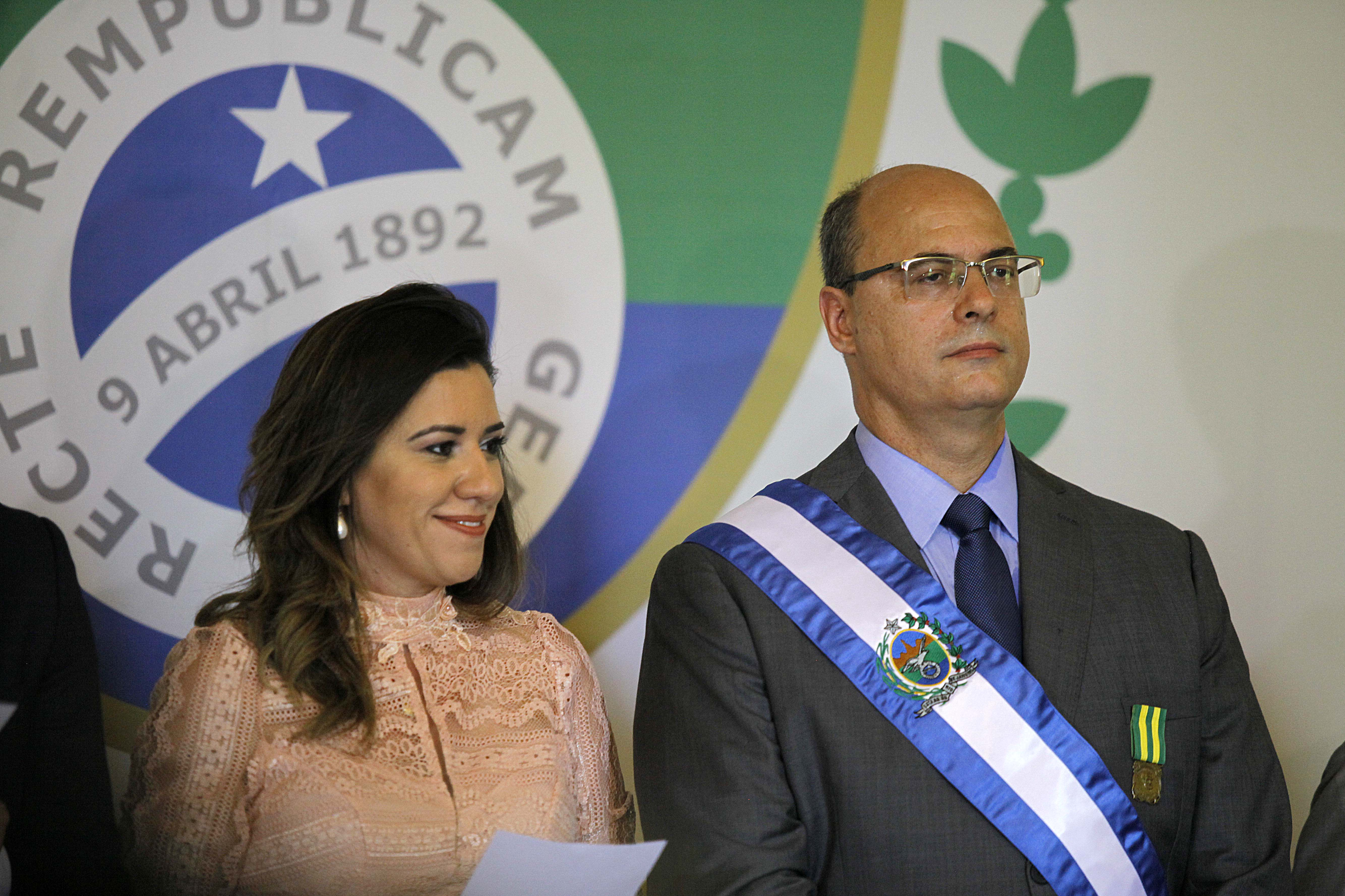 RJ 02-01-2018. Posse do Governador Wilson Witzel no Palácio Guanabara.Fotógrafo: André Gomes de Melo